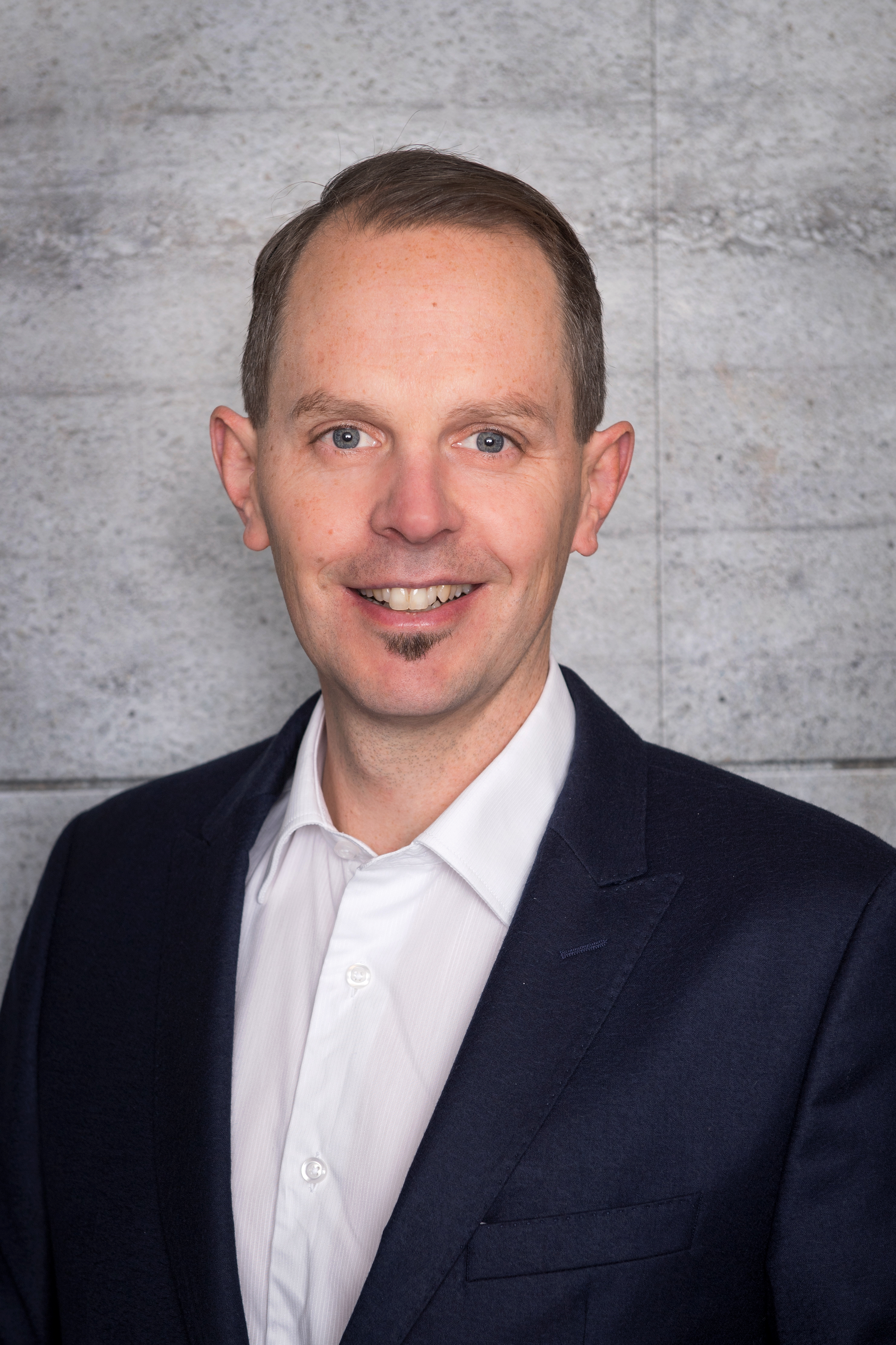 Dominik Steiner, Wahlkampf-Foto von der Landratskandidatur 2018